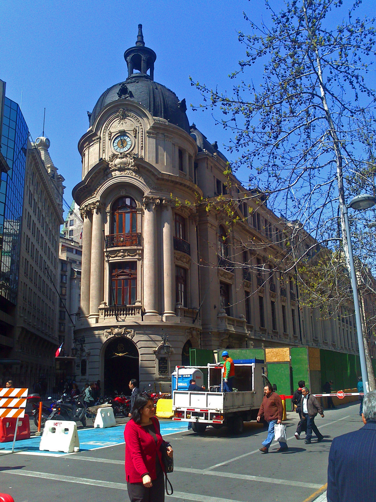 Bolsa de Comercio de Santiago This is a photo of a national monument in Chile: 841